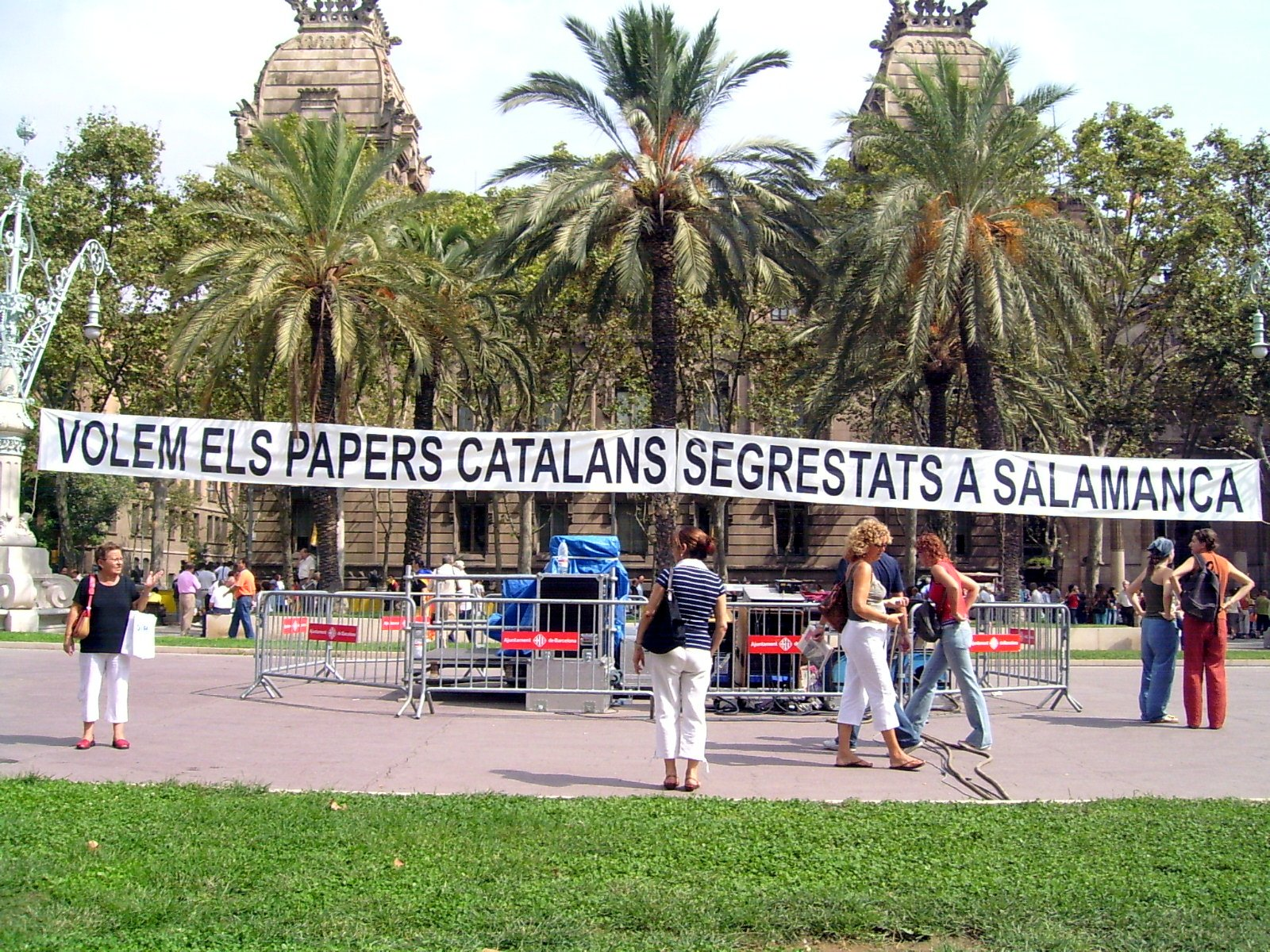 Cartell reclamant el retorn dels "Papers de Salamanca" en un acte de l'11 de setembre del 2004, a Barcelona.